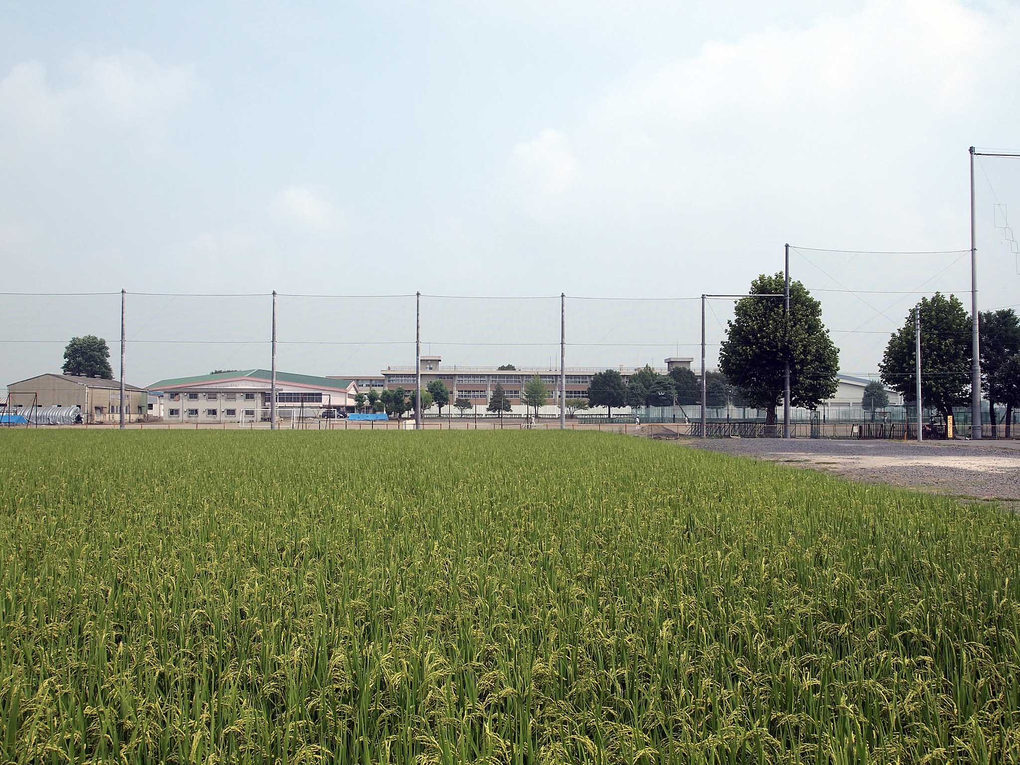 栃木県道193号線から栃木県立宇都宮南高等学校を望む